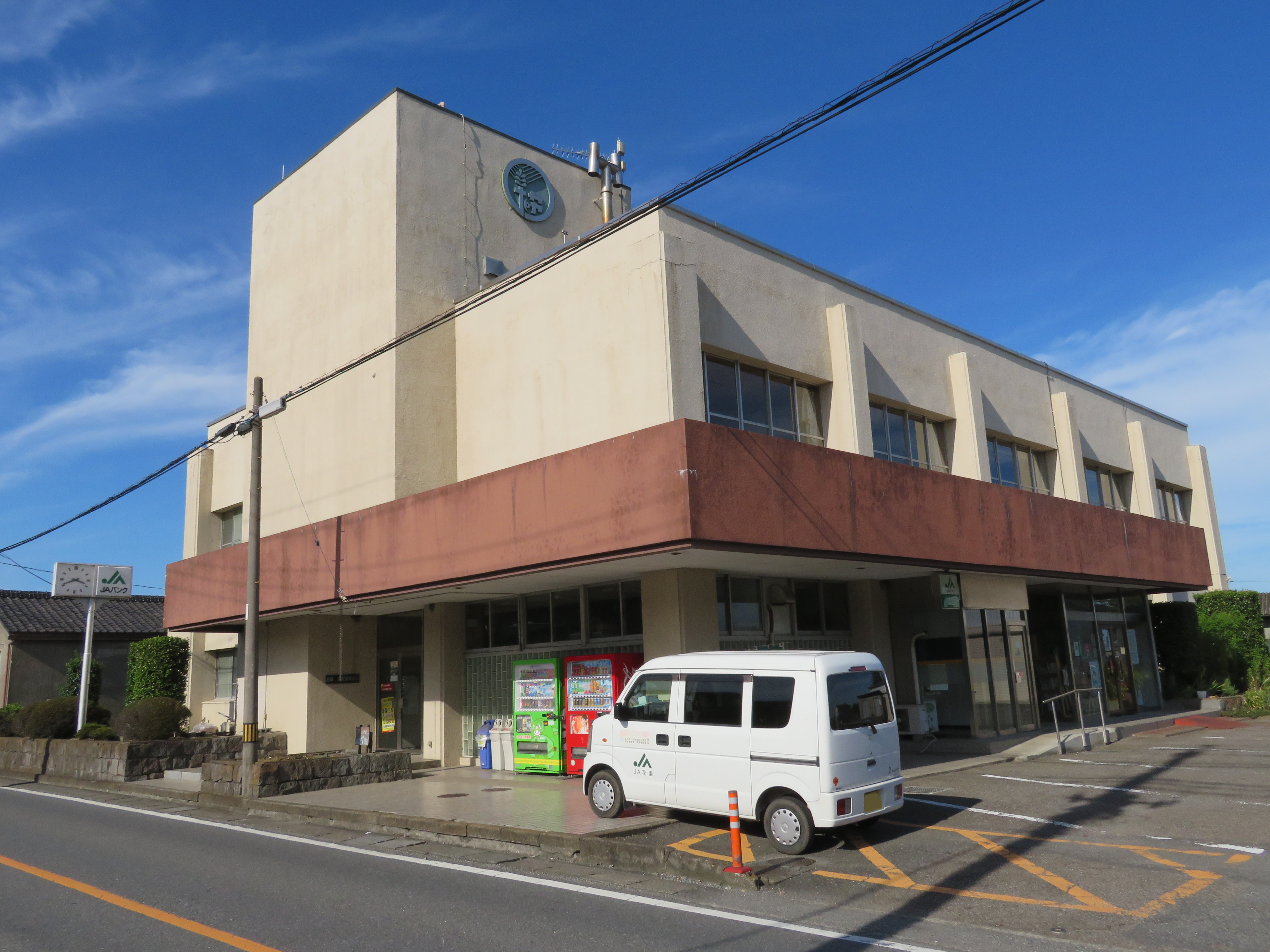 埼玉県深谷市にある花園農業協同組合本店 Canon PowerShot SX720 HS